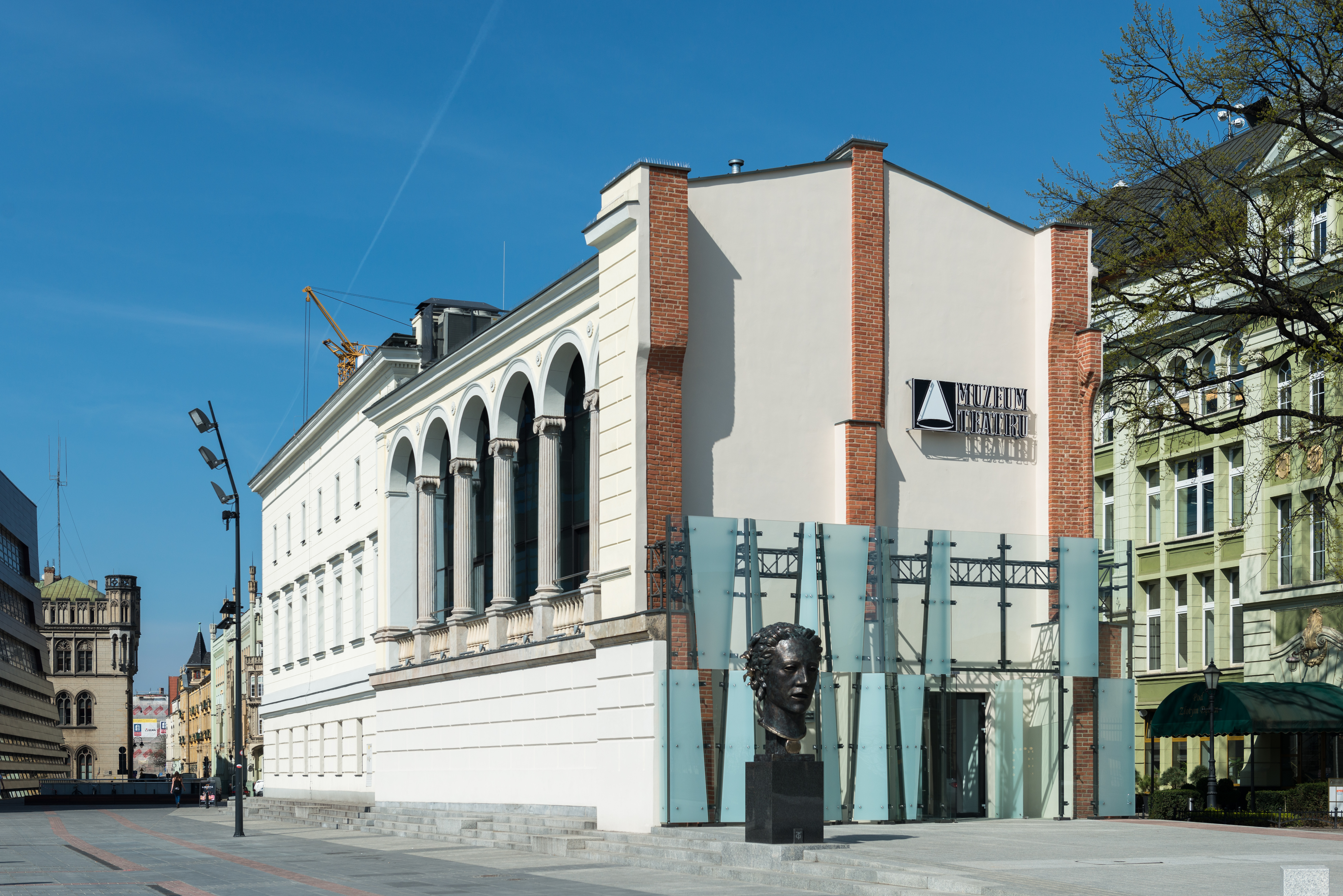 Muzeum Teatru im. Henryka Tomaszewskiego, Oddział Muzeum Miejskiego Wrocławia, pl. Wolności 7a.